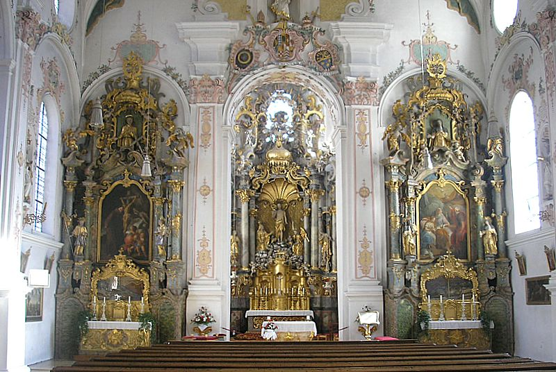 Wallfahrtskirche Maria Hilf (Klosterlechfeld, Landkreis Augsburg, Bayerisch-Schwaben). Chor und Seitenaltäre. Eigene Aufnahme, Okt. 2006 / Pilgrimage church Klosterlechfeld near Landsberg am Lech, Bavaria, Germany. The choir and the altars. Own photo, Oct. 2006